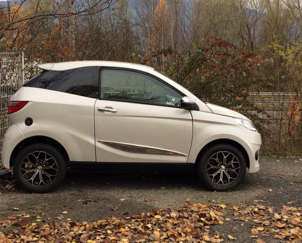 coupé premium aixam